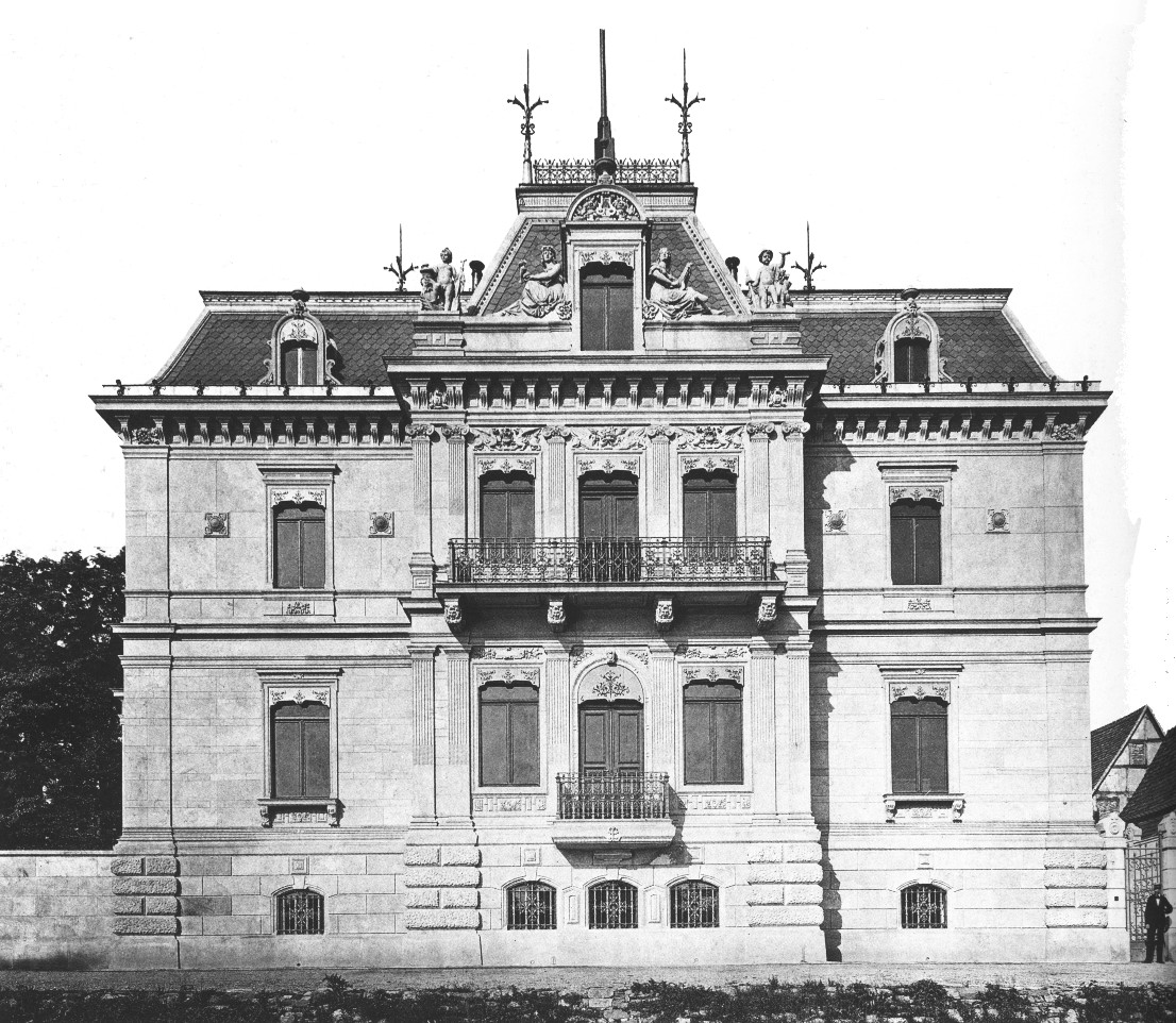 Villa Hartmann in (Dresden-) Laubegast, Laubegaster Ufer 33; aufgenommen kurz nach bzw. während des Baus (um 1875)